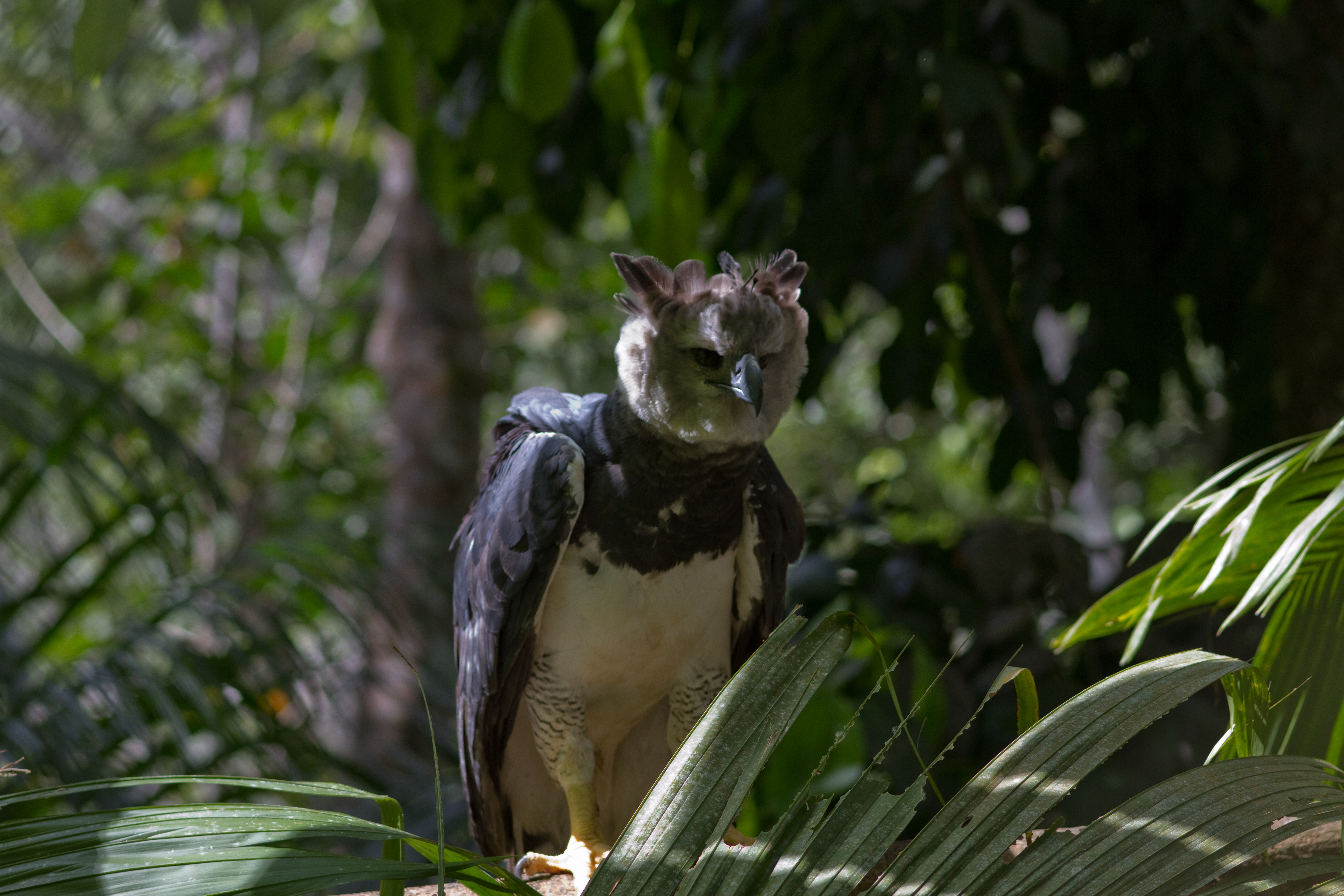 Harpy Eagle (Harpia harpyja)